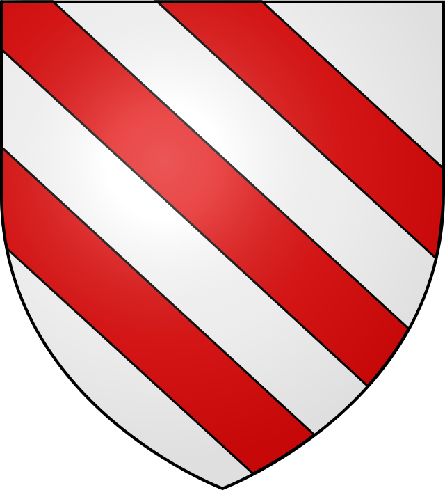 Armoiries du baron de Barsy.